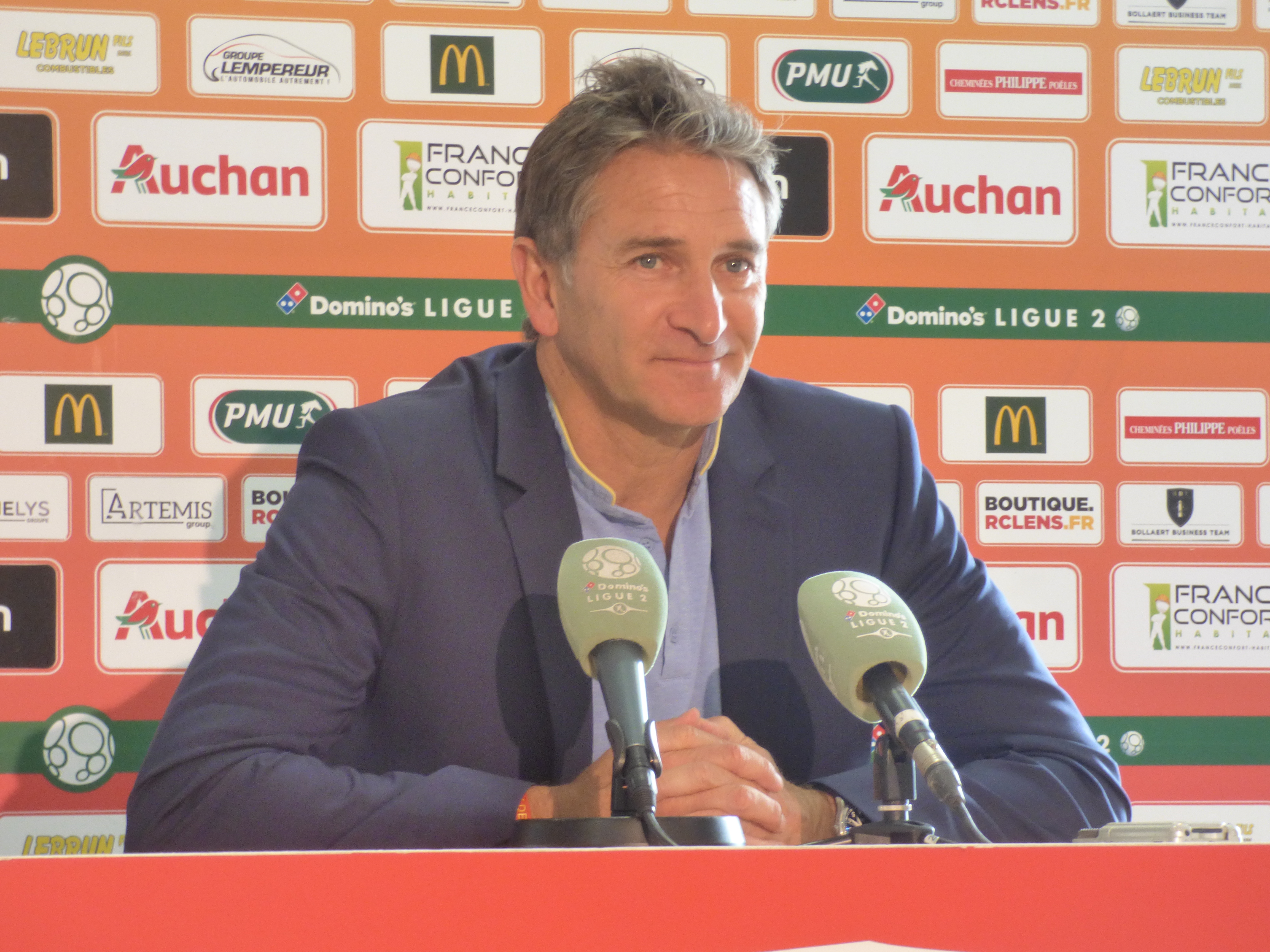 Philippe Montanier après le match Lens / Sochaux, comptant pour la septième journée du championnat de France de football de Ligue 2, le 15 septembre 2018.